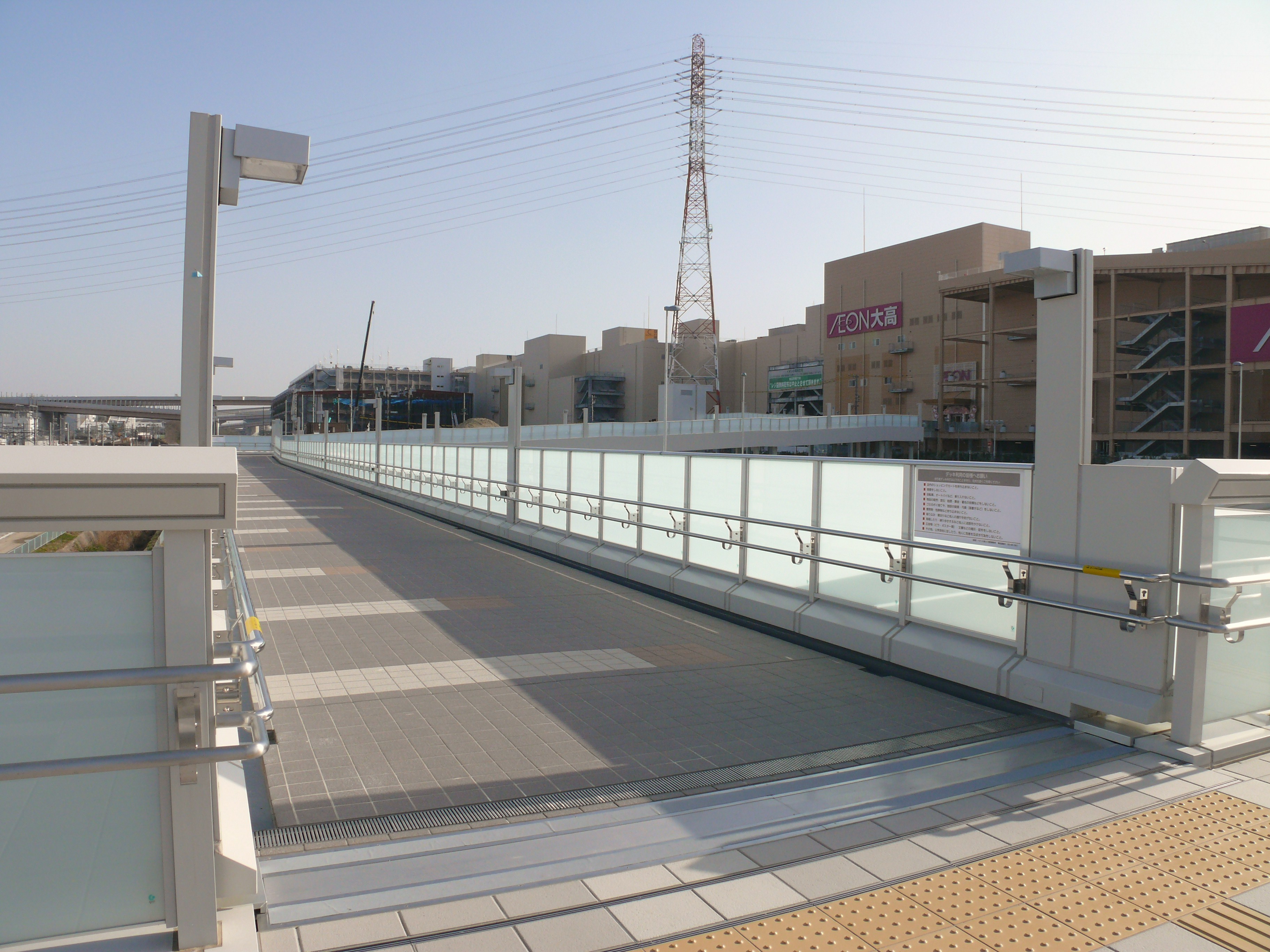 JR東海の東海道本線の南大高駅